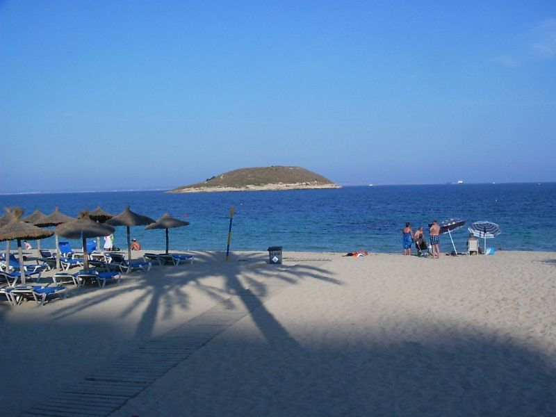 Magaluf beach